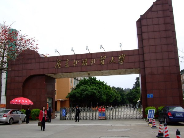 广东外语外贸大学北校区大门，由上传者拍摄，为600像素低分辨率版。